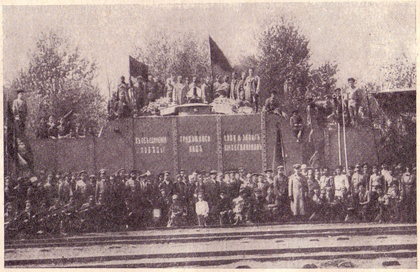 Красный бронепоезд имени Ленина на станции Дружковка в Донбассе. Отвратительное качество изображения обусловлено печатью.